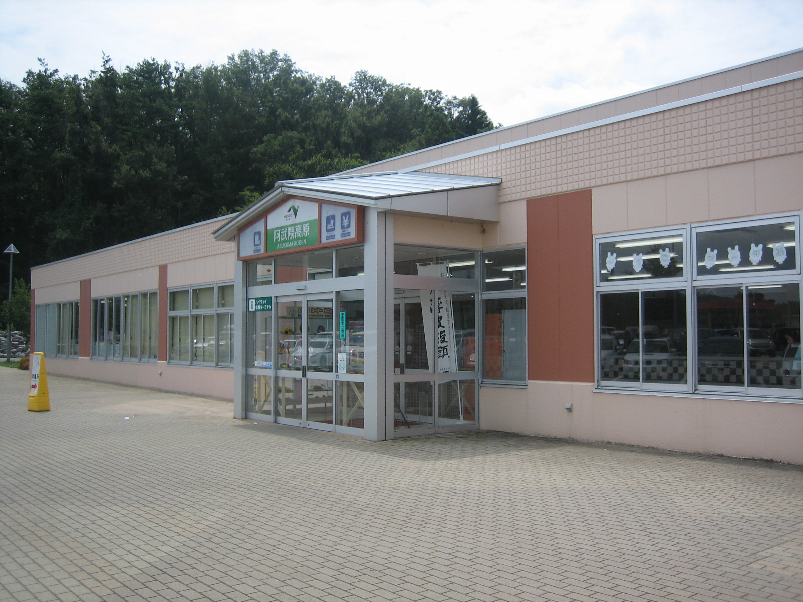 磐越自動車道下り線阿武隈高原サービスエリアの施設